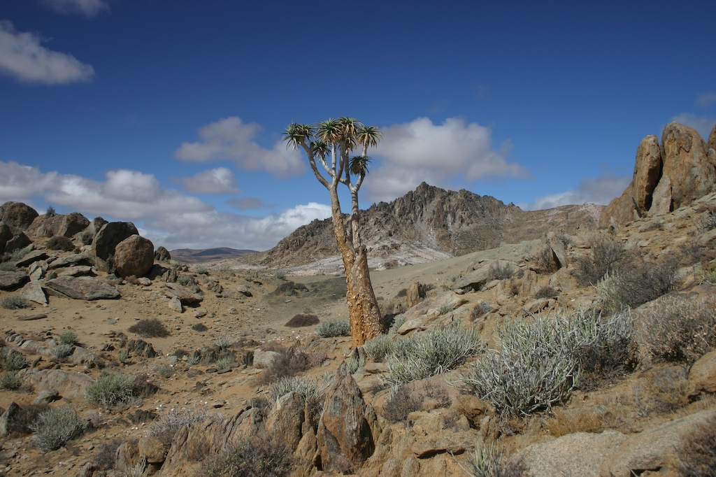 Aloe dichotoma, Richtersveld Conservancy, near Eksteenfontein